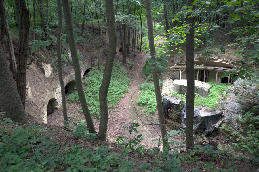 Fort Hahneberg September 2013